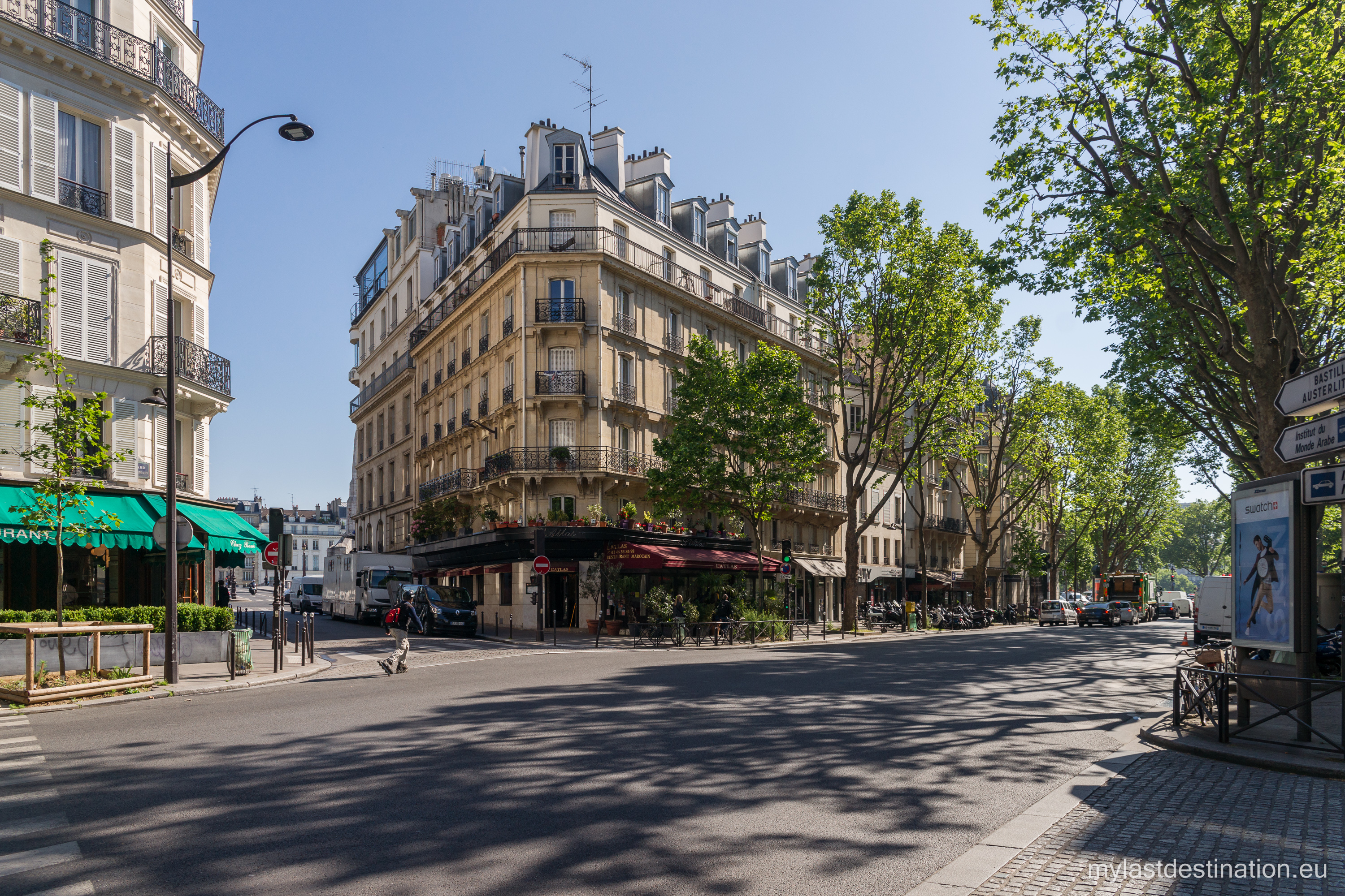 Croisement